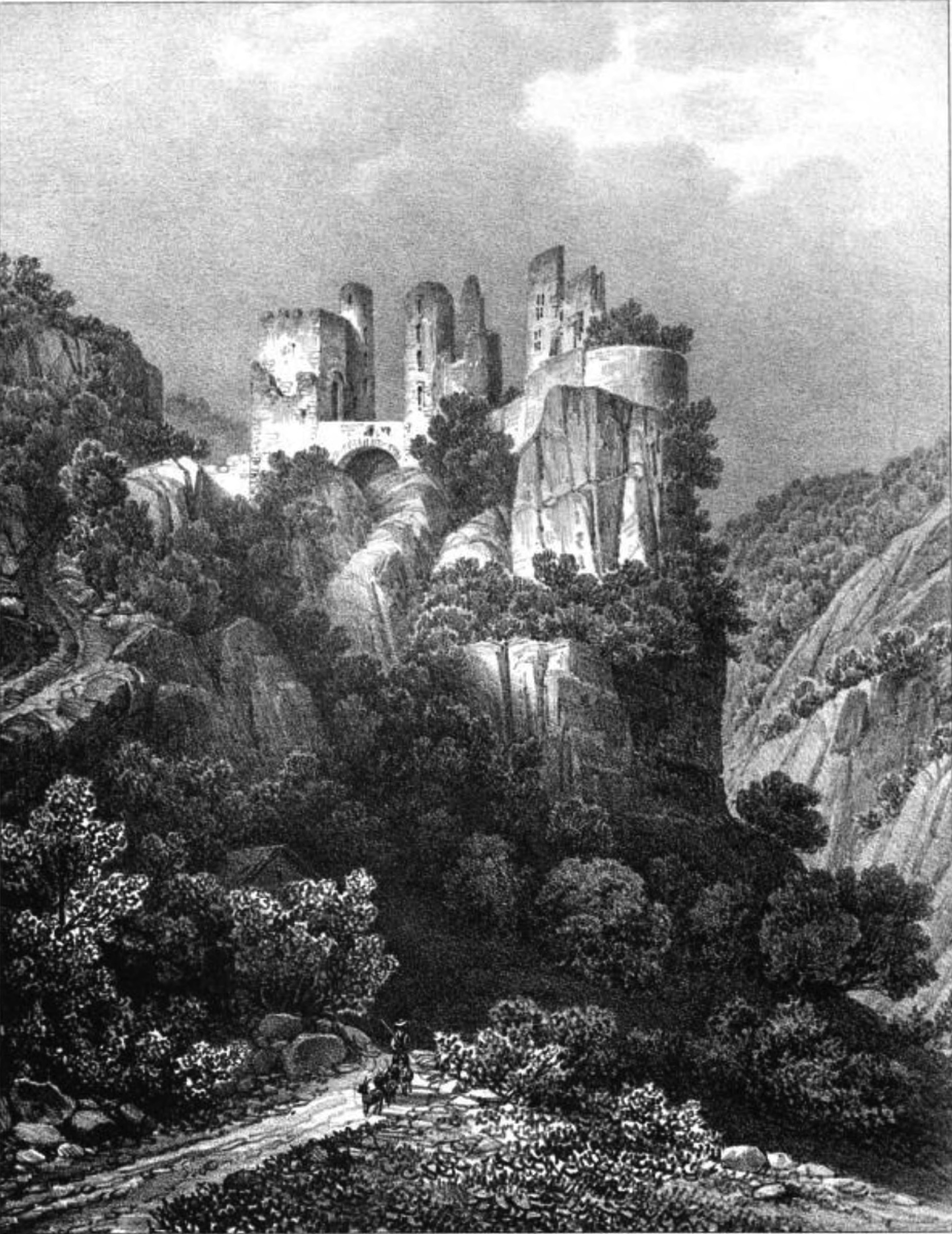 Album du Dauphiné - tome III, lithographie du Château de Rochechinard, Drome